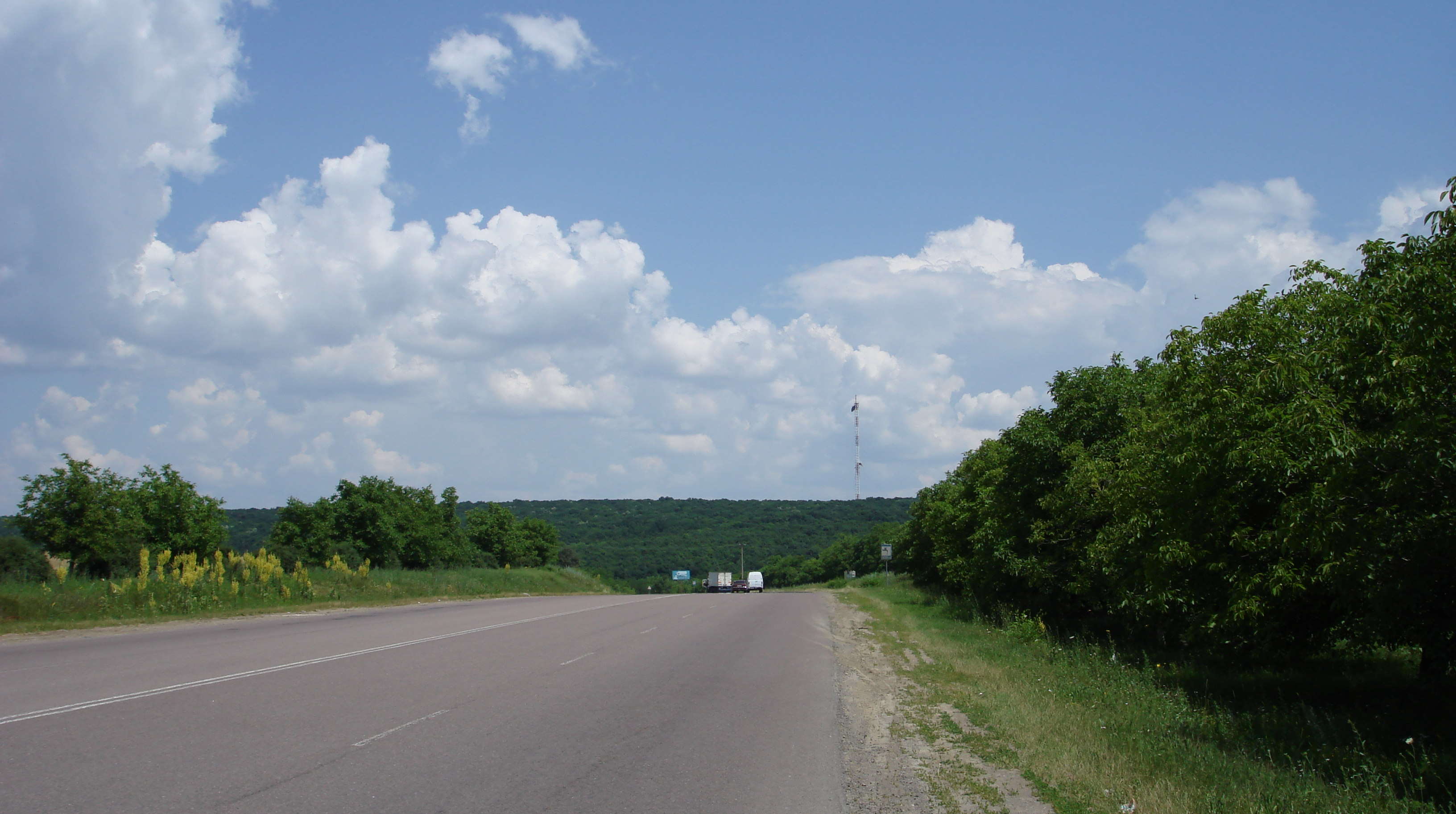 Silnice v Orheievském rajóně v Moldavsku